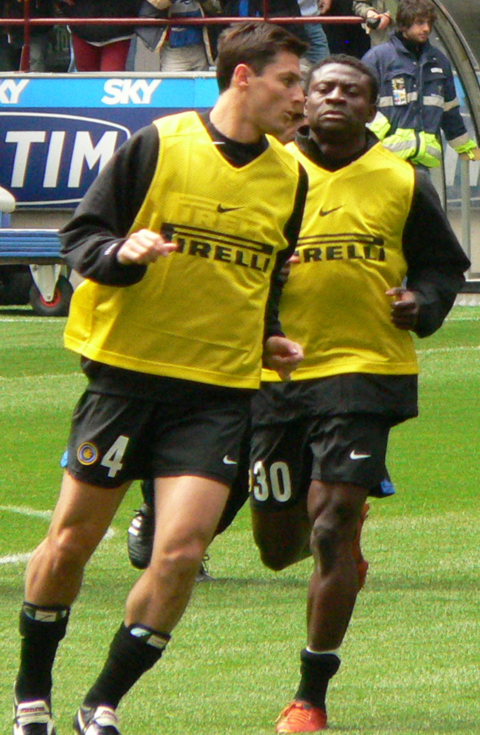 qualche giorno dopo l'eliminazione dalla champions, uno stadio distaccato accoglie i giocatori dell'inter nei minuti che precedono la partita con il cagliari.